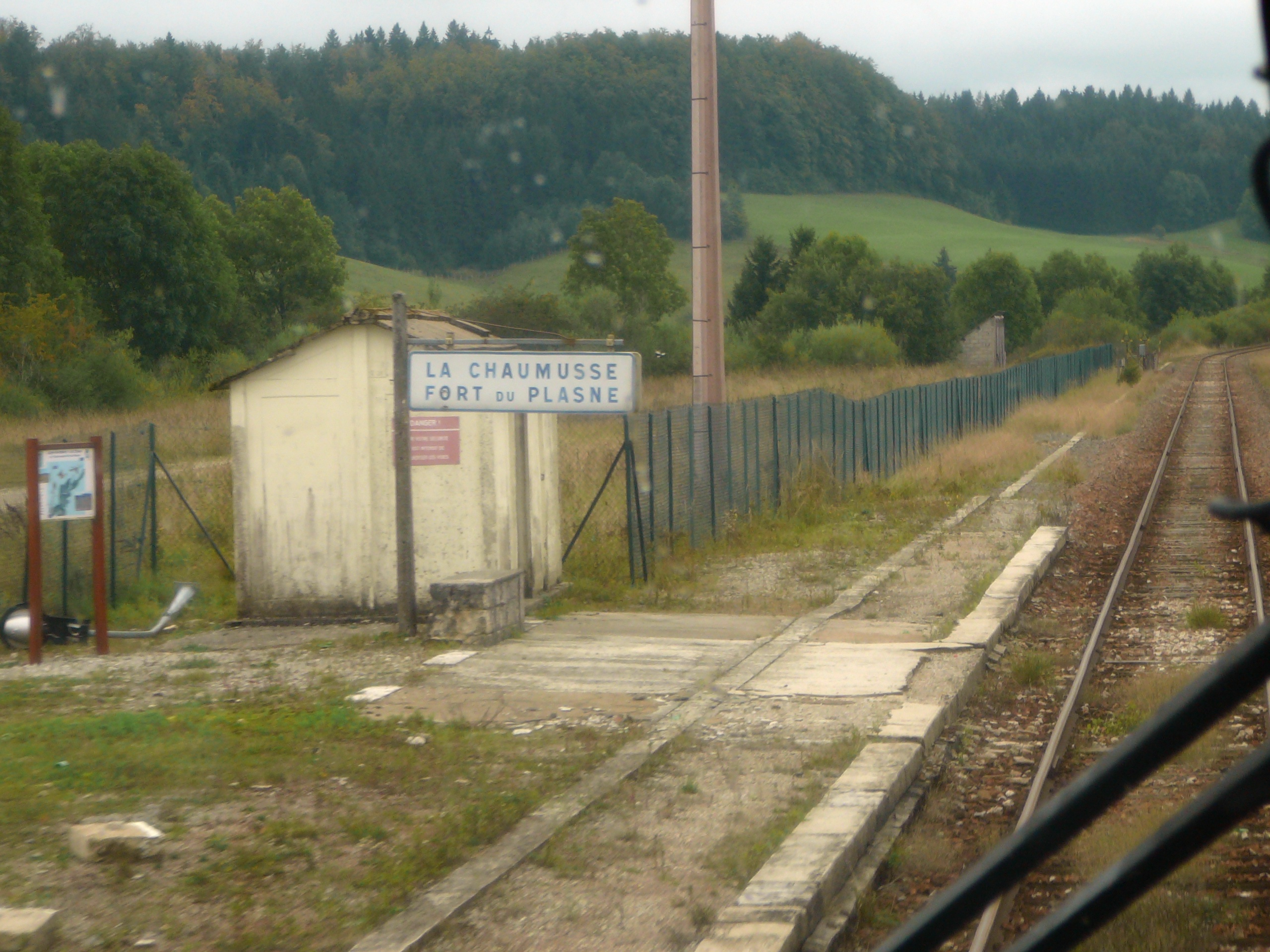 Halte de La Chaumusse - Fort-du-Plasne